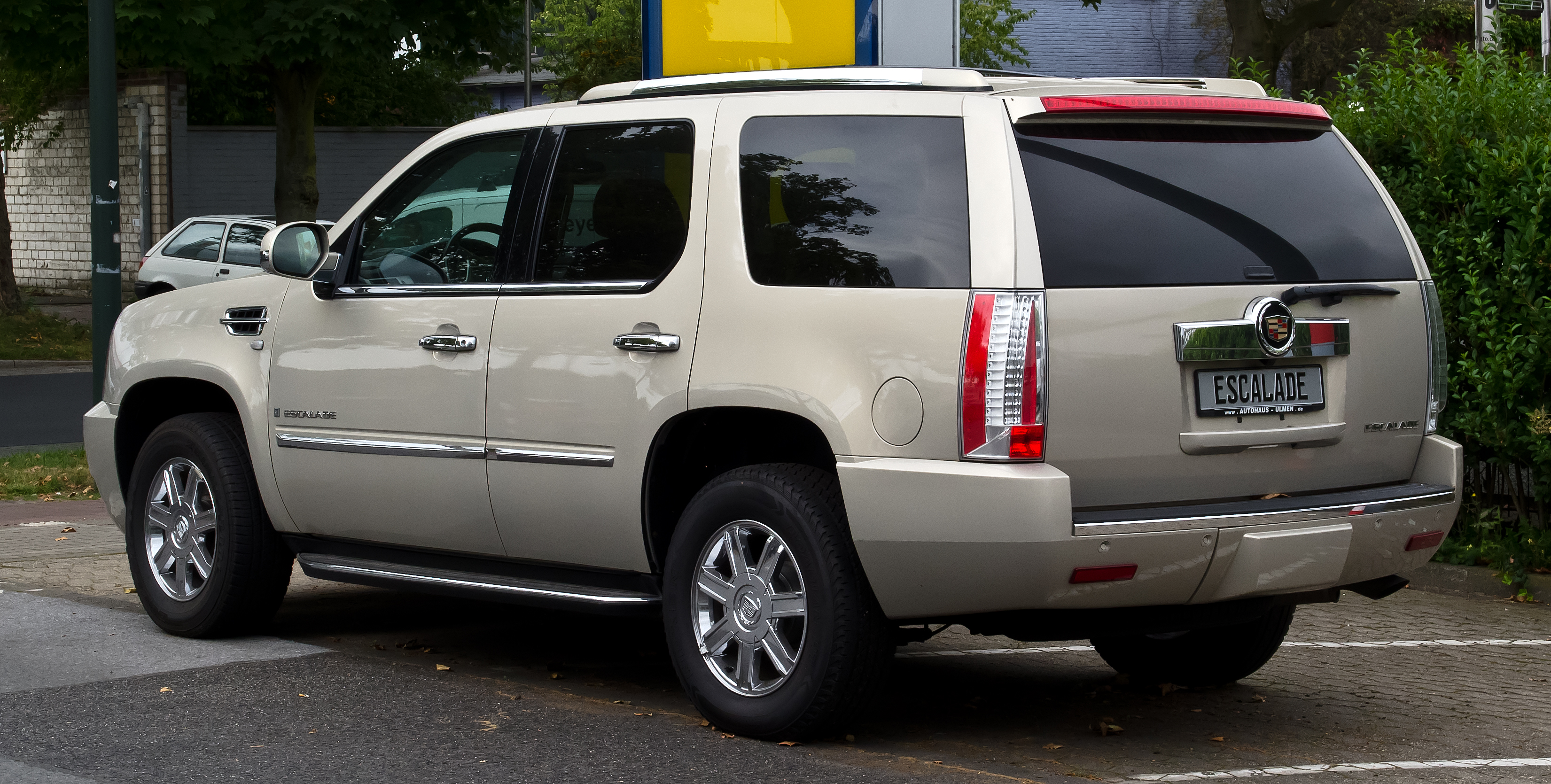 Cadillac Escalade 6.2 V8 Sport Luxury (III)